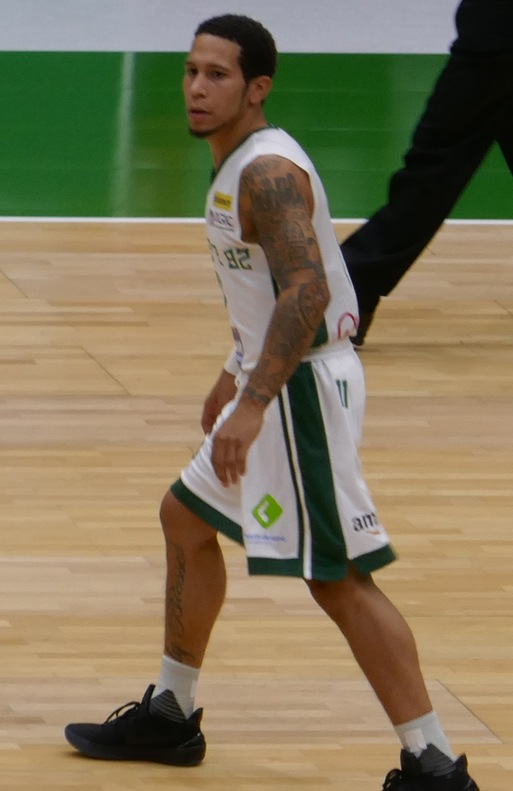 Nic Moore avec Nanterre 92